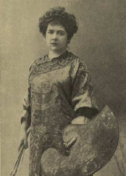 Fotografía de E.N. Klokacheva aparecida Novoe Vremia en 1907